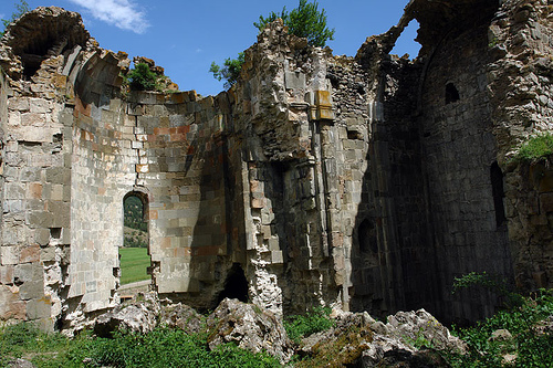 Tbeti in Tao-Klarjeti